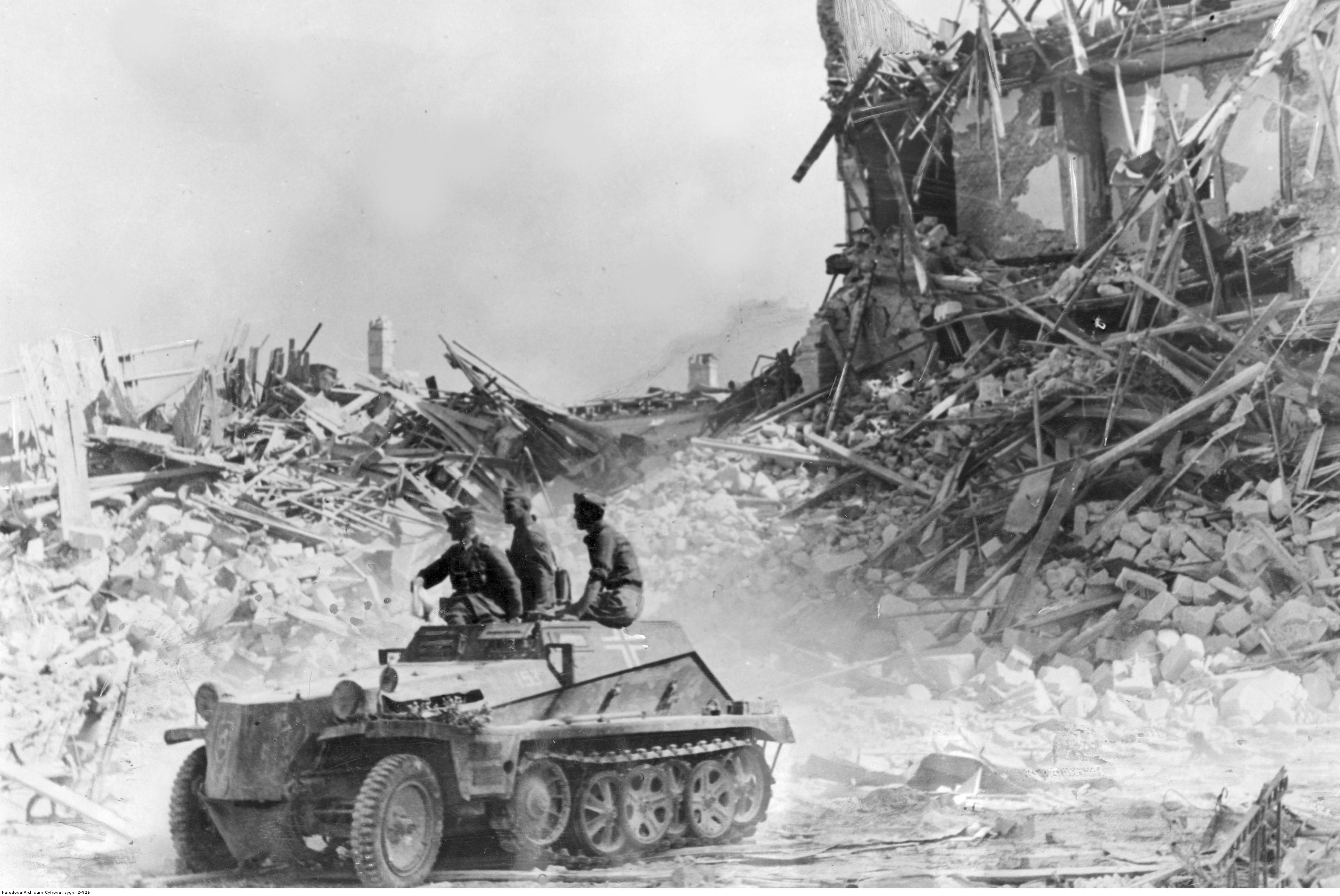 Pułkownik Ernst Maisel kieruje działaniami wojennymi z wozu pancernego SdKfz 253.